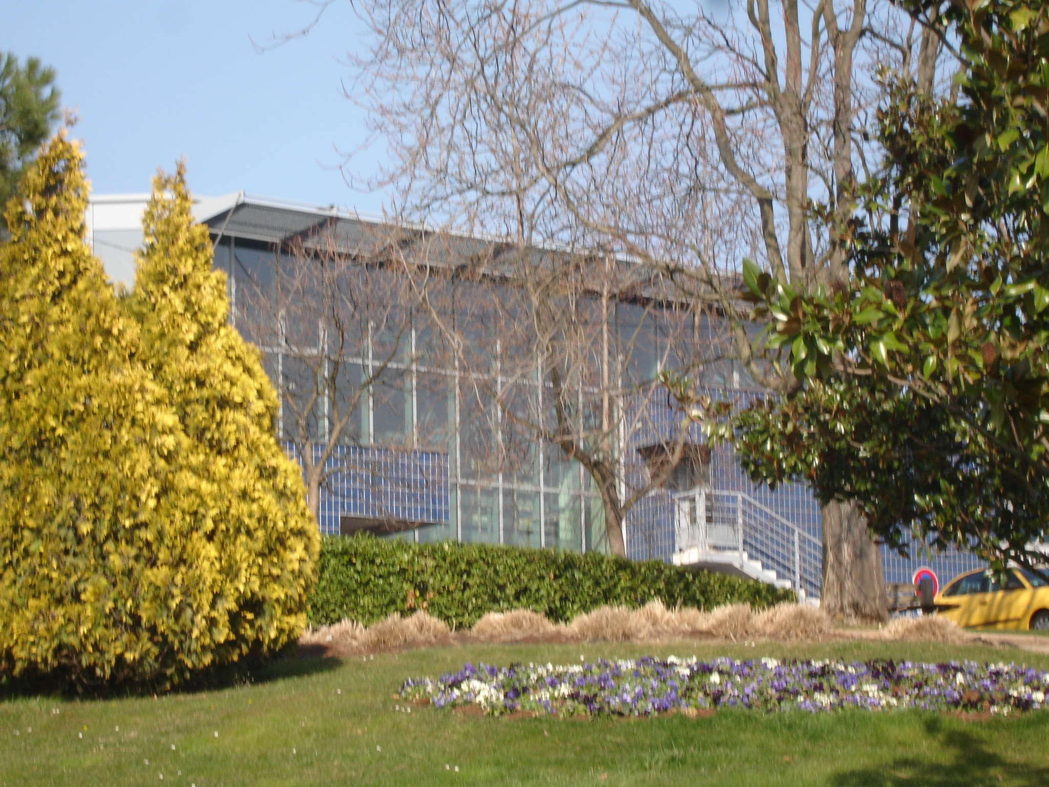 Feyzin (69) : la médiathèque